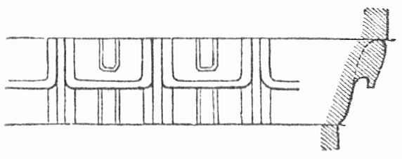 Dorische Kymation. Artikel Kymation in: Meyers Großes Konversations-Lexikon 6. Auflage 1905–1909